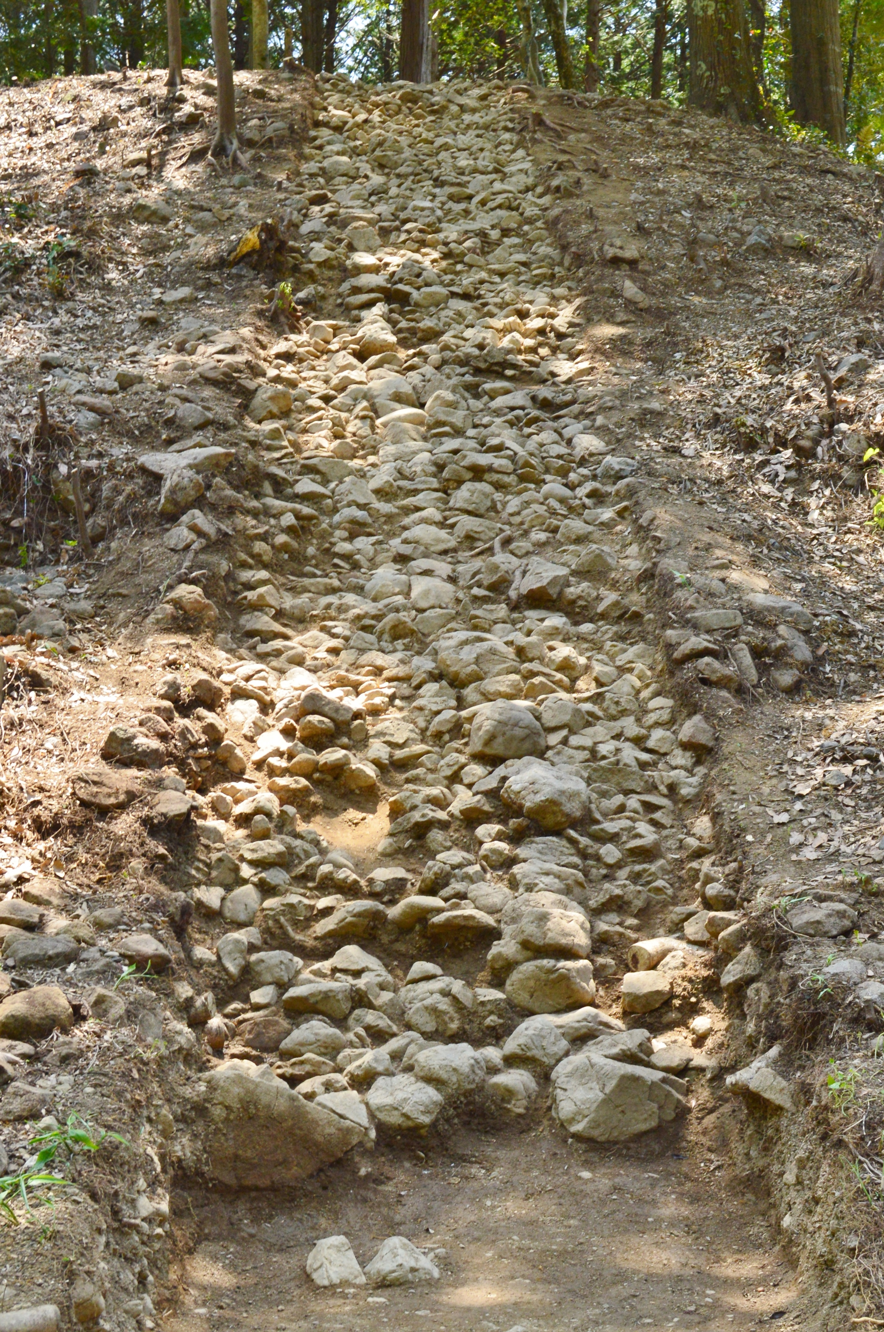 光明山古墳 後円部墳丘の葺石 (2018年調査時)